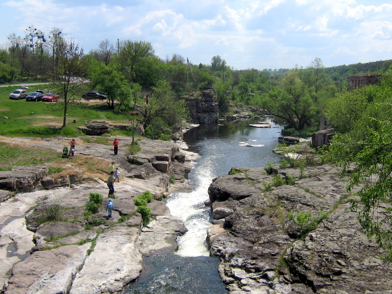 Буцький коньцон